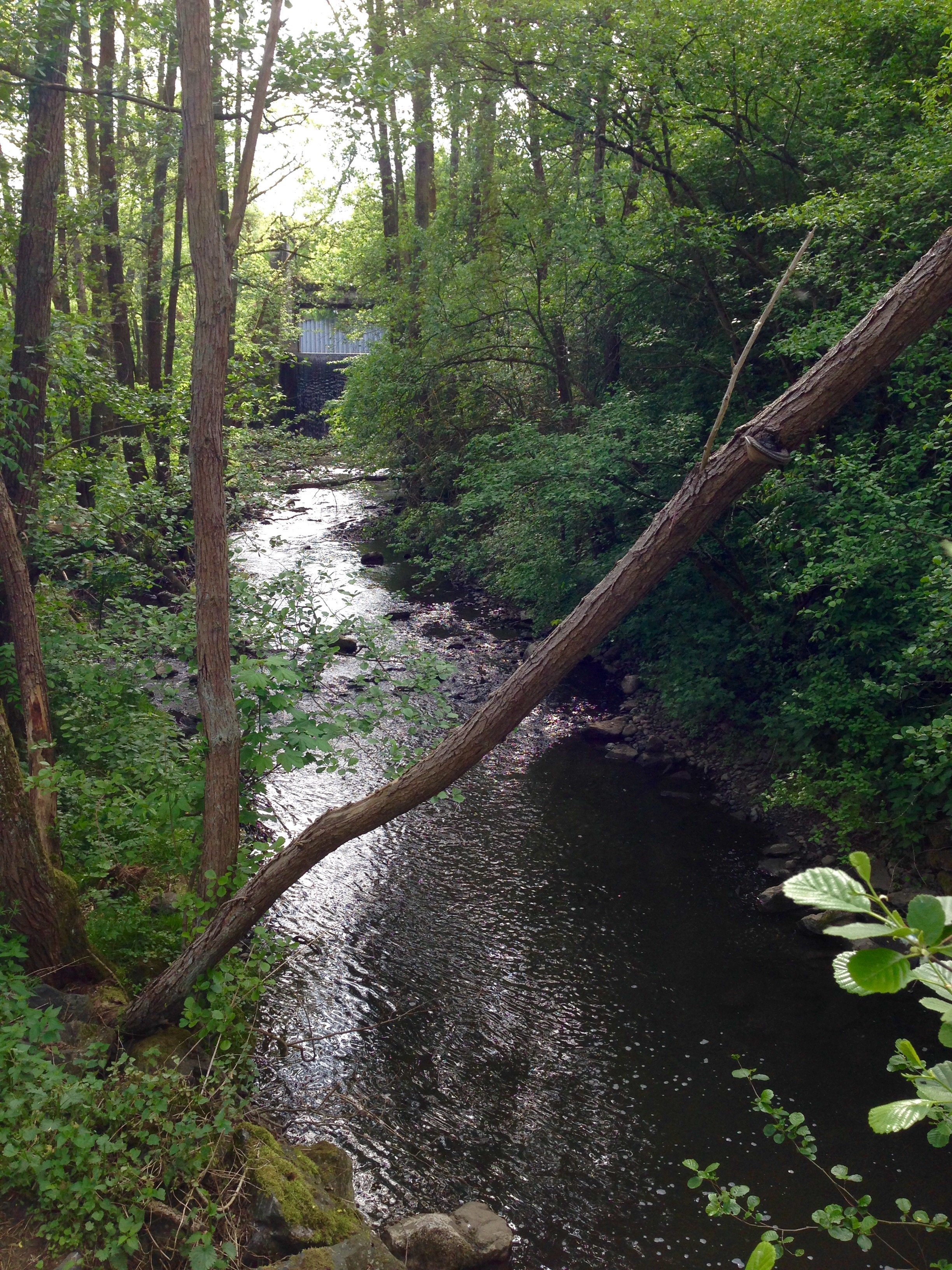 Standort Rehbachbrücke zwischen Sinn und Herborn. Überlauf Stauweiher